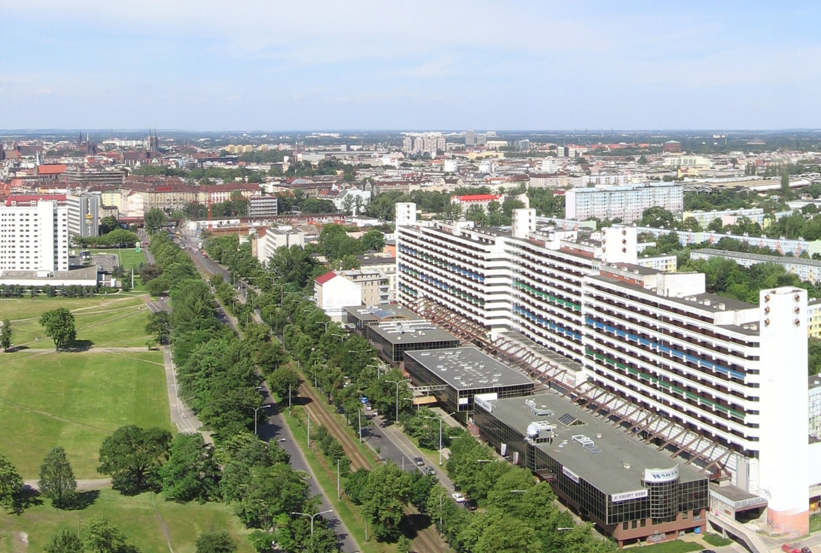 ul. Powstańców Śląskich we Wrocławiu, widok z ostatniego piętra nieistniejącego biurowca "Poltegor"-u w kierunku północnym